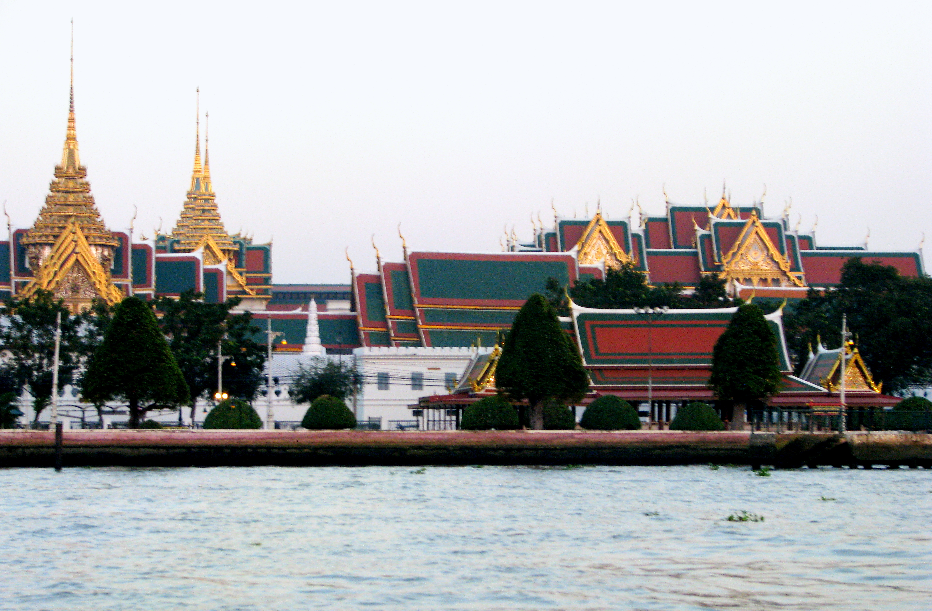 Bangkok '08 - 26